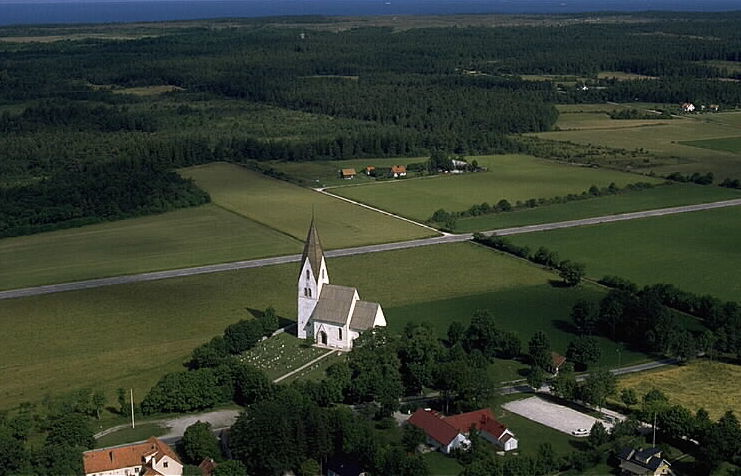 Motiv: Tofta kyrka Nyckelord: Flygbilder, Riksintressen Kategori: Kyrkomiljö Tofta kyrka